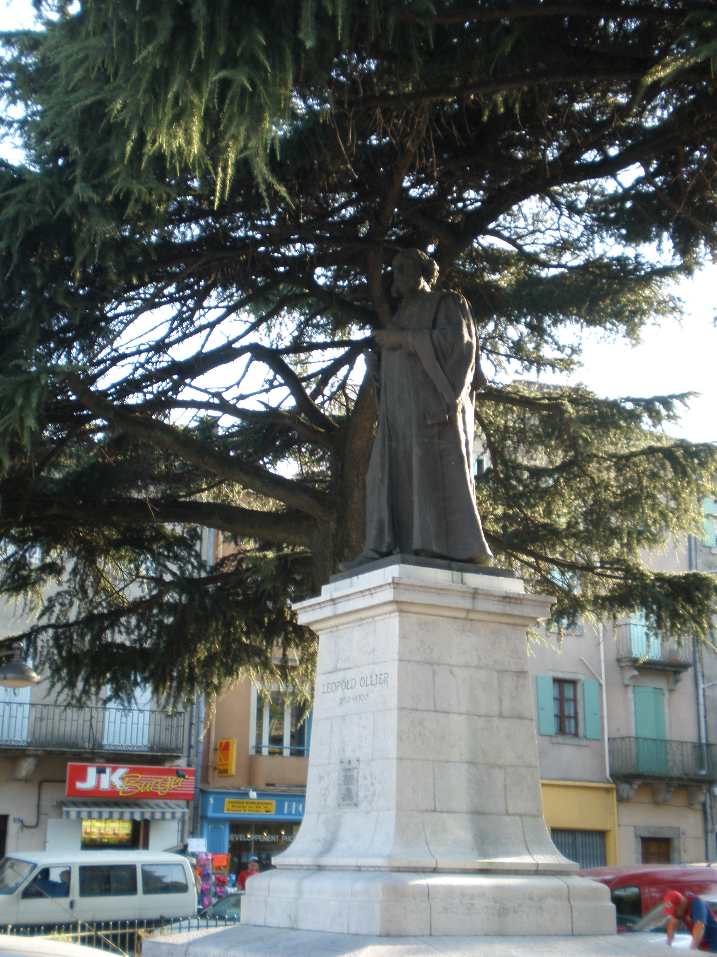 La statue de Léopold Ollier aux Vans (Ardèche)